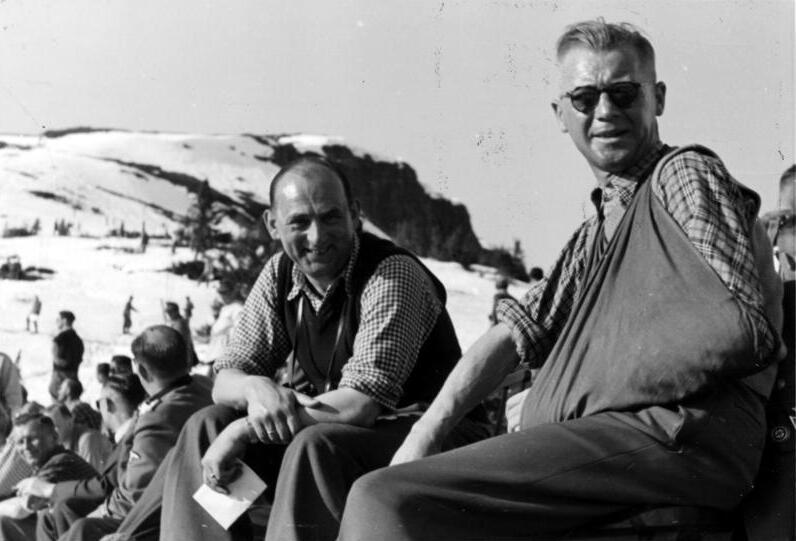 Skeikampen April 42 General Daluege und Gauleiter Reichskommissar Terboven